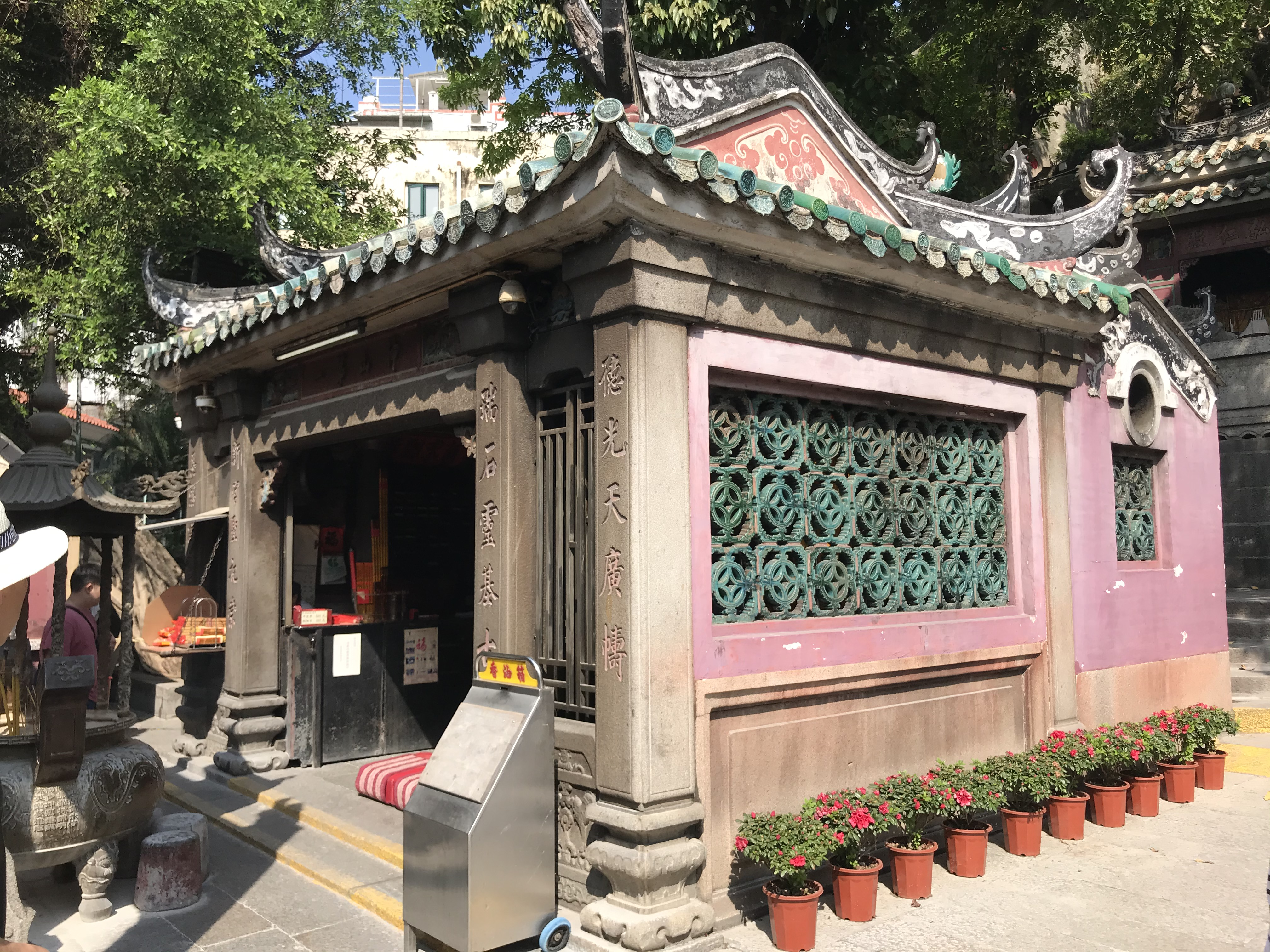 中文（台灣）: 澳門媽祖閣石殿